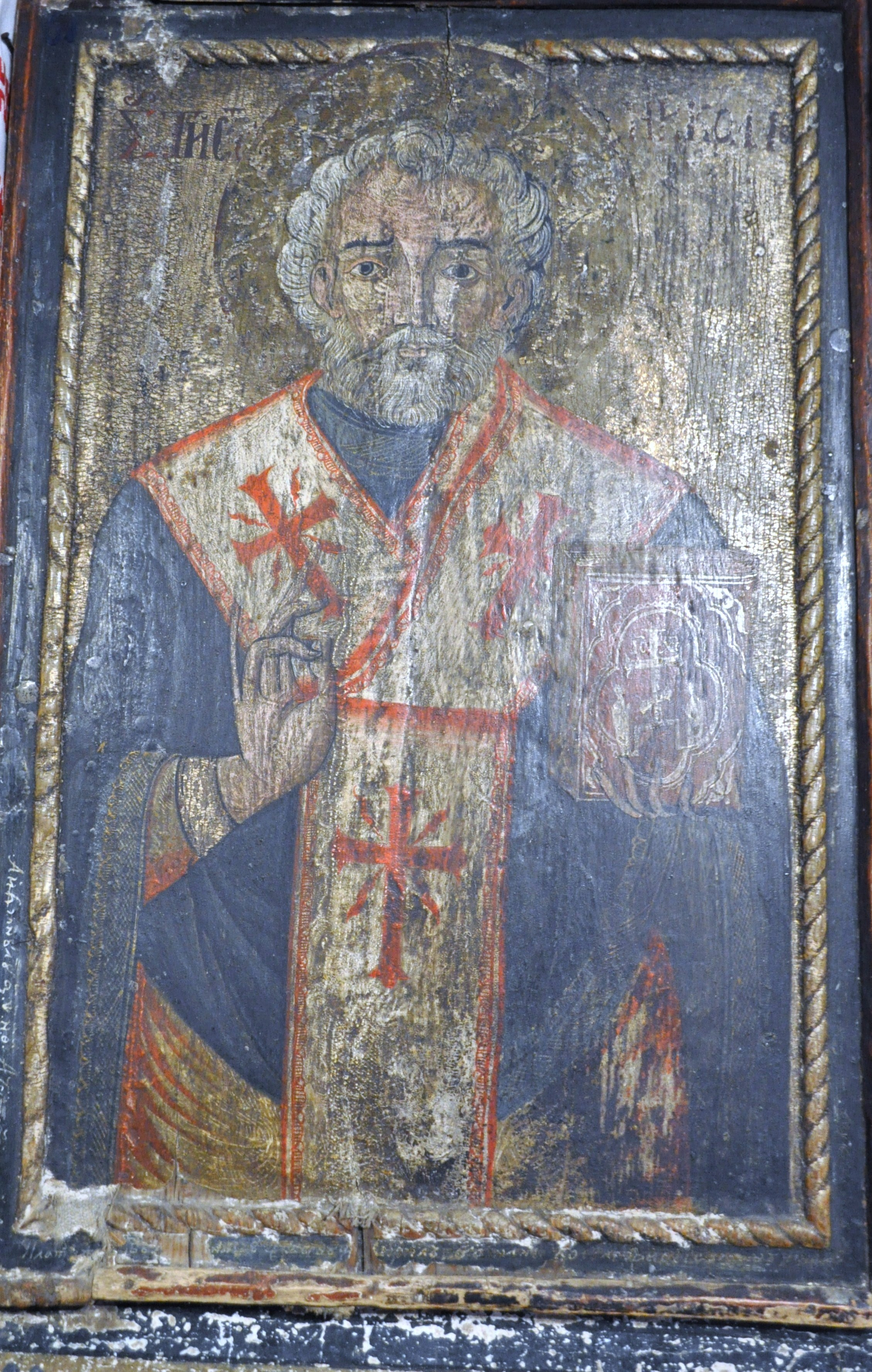 Biserica de lemn „Sfântul Nicolae” din Ciubăncuța